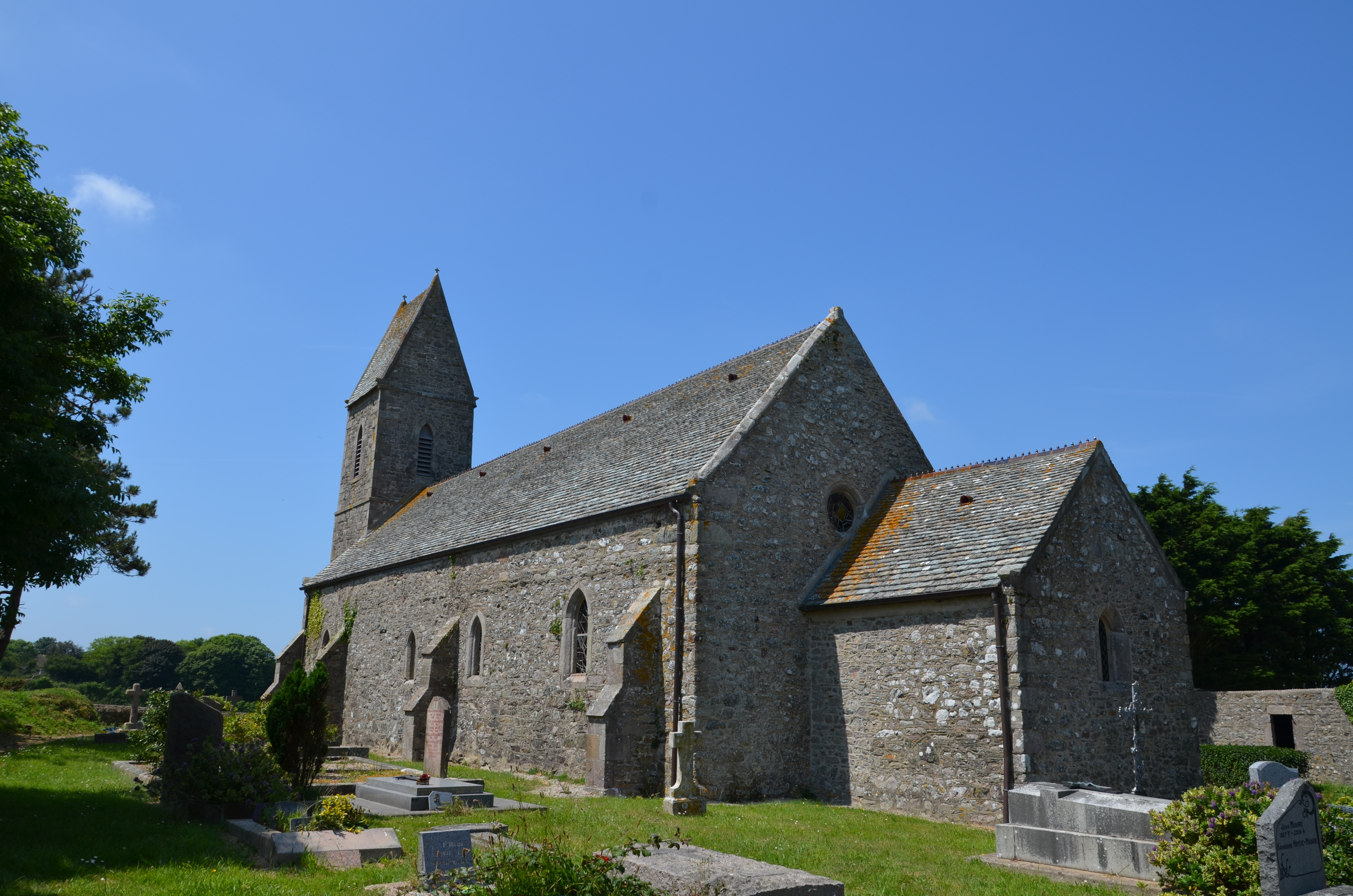 Église Saint-Martin d'Éculleville.